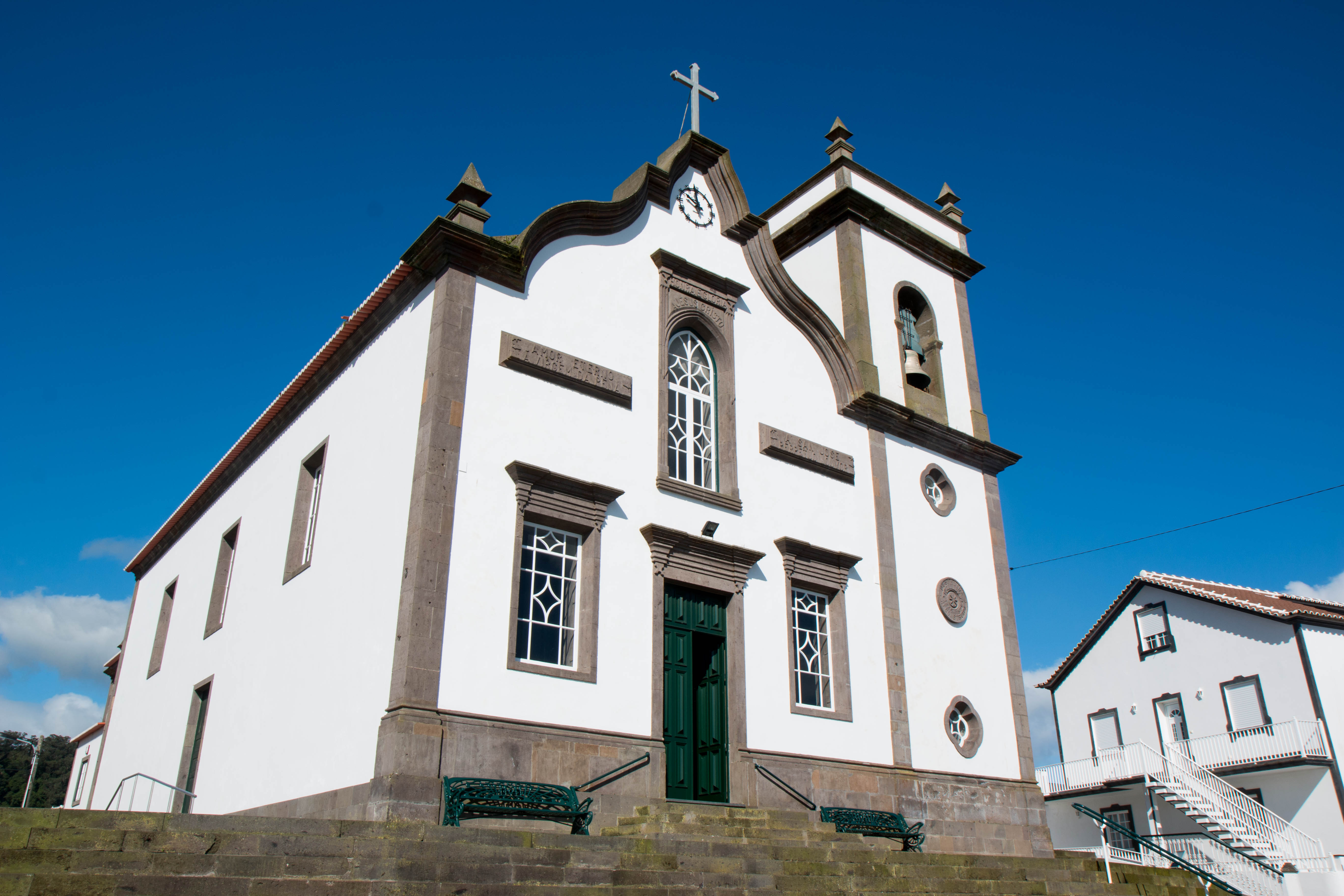 Igreja de Nossa Senhora da Pena